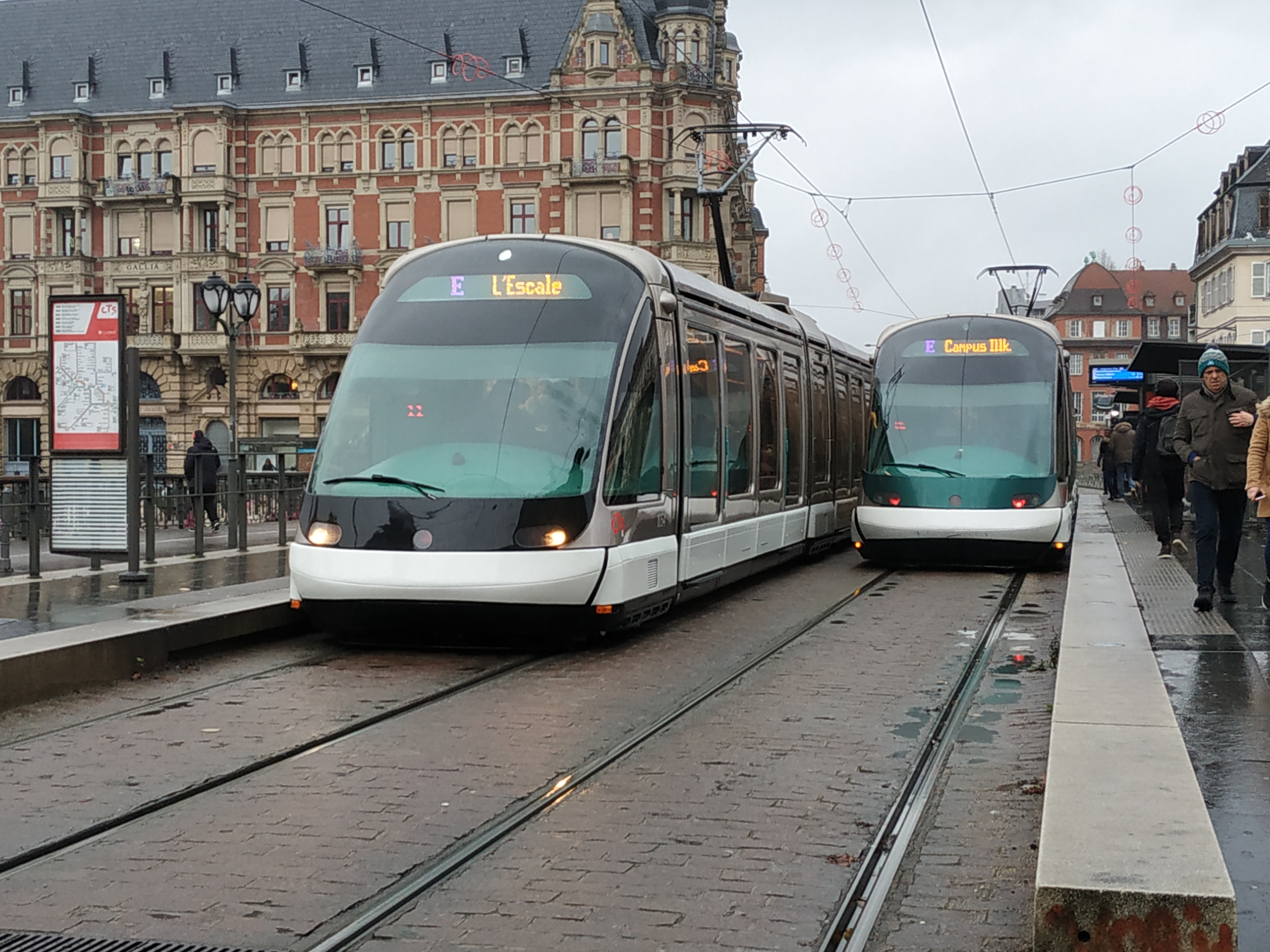 Vue extérieure de la rénovation d'un Eurotram CTS en 2019, ici la rame 1054. La rame est vue ici aux côtés d'une rame non-rénovée, montrant la différence de couleurs du nez de la rame : noir pour la rénovation, vert foncé au préalable.